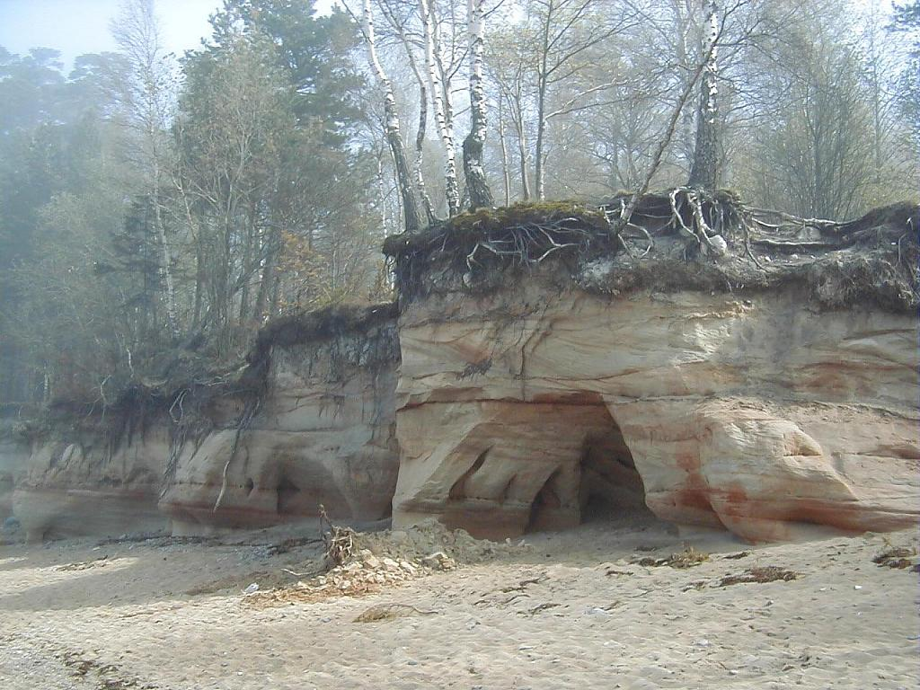 Veczemju klintis Vidzemes jūrmalā 2002-05-01